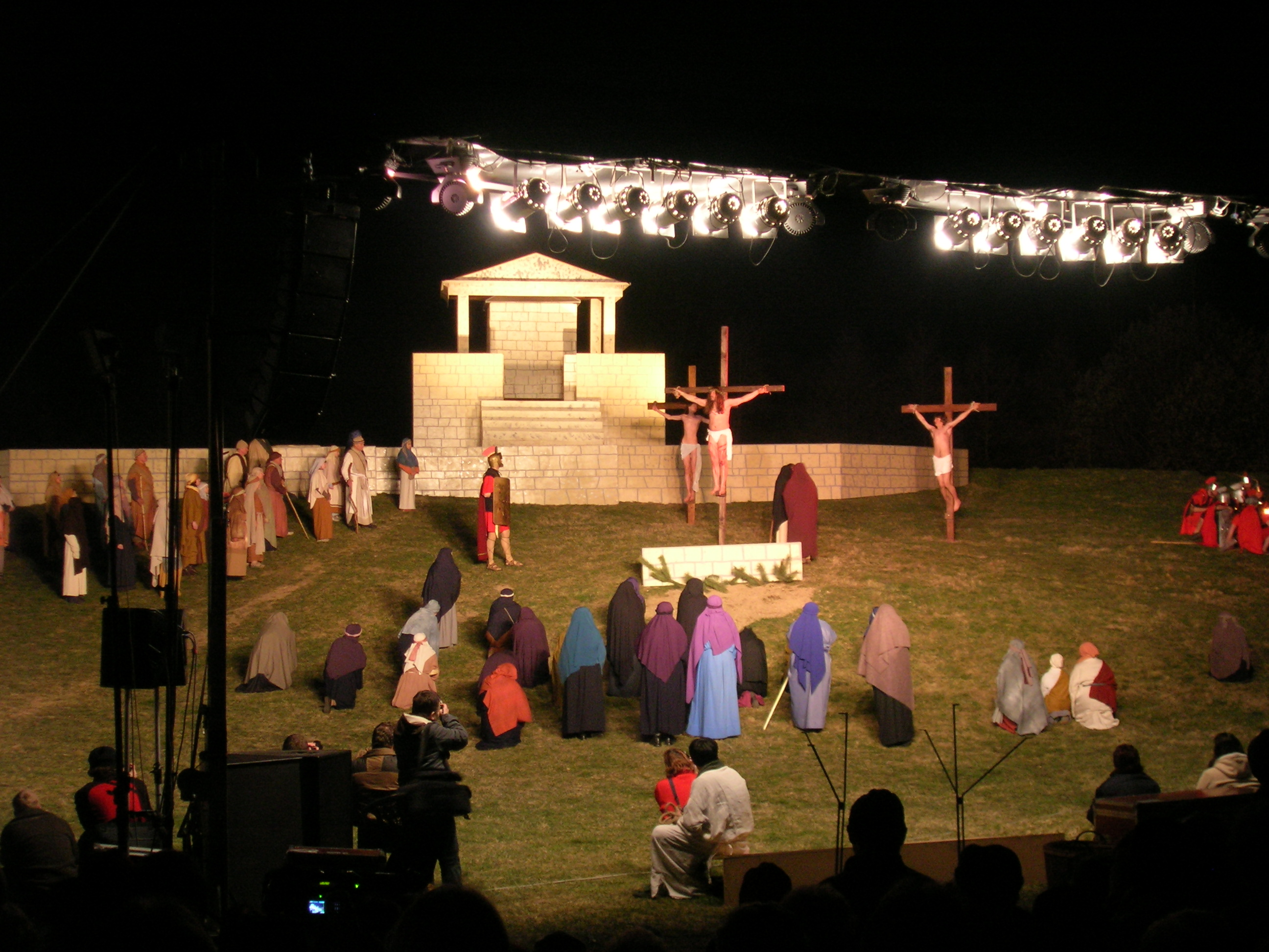 Žďár nad Sázavou. Passion play, 2007. 49°34'9.19"N,15°56'14.81"E